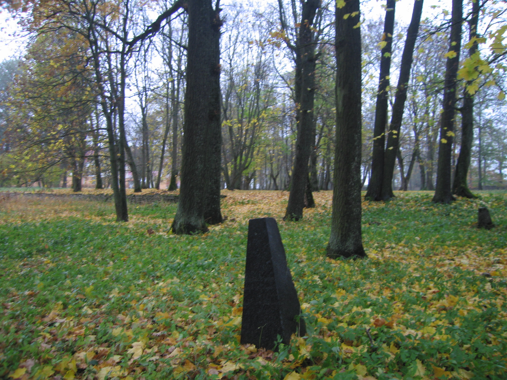 Hauatähis Maardu mõisa kalmistul